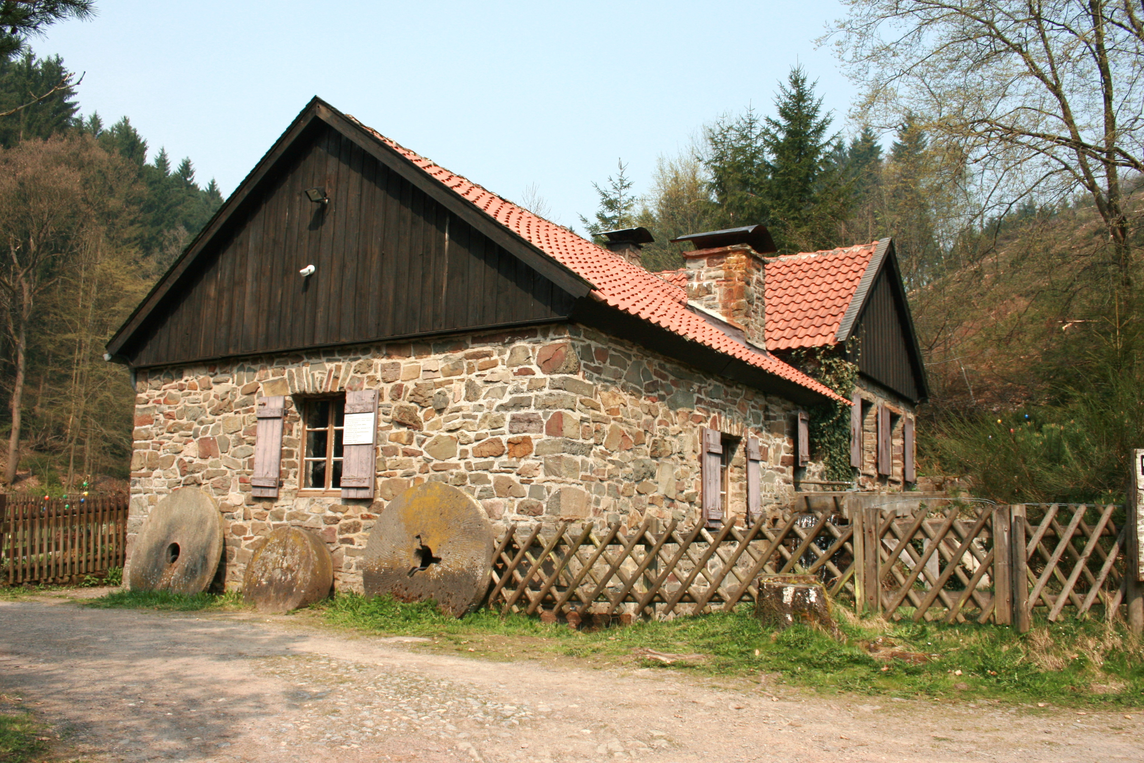 Brenscheider Ölmühle in Brenscheid, Nachrodt-Wiblingwerde